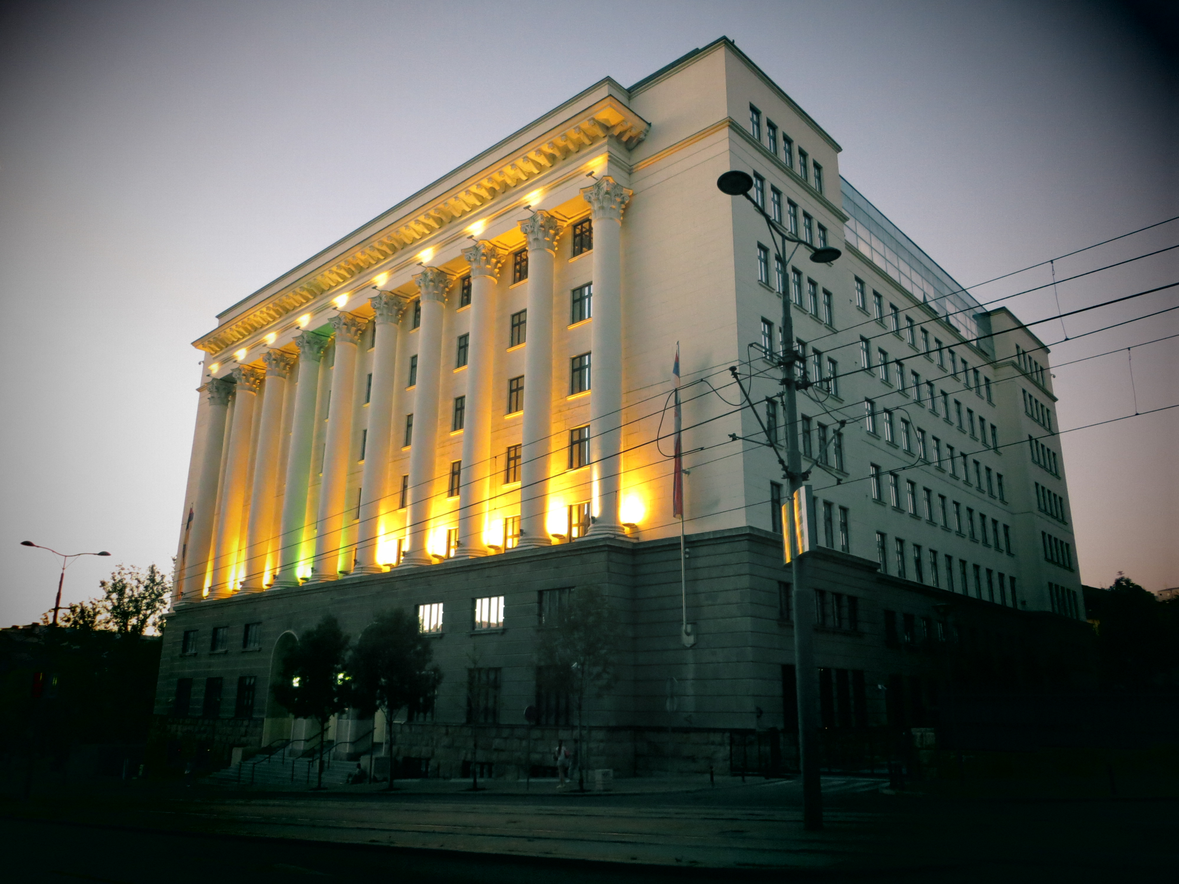 Apelacioni sud